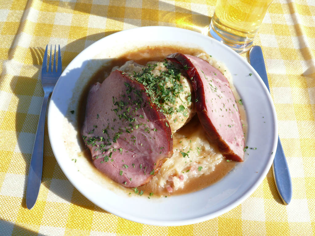 Geselchtes mit Kraut und Knödel (Semmelknödel)